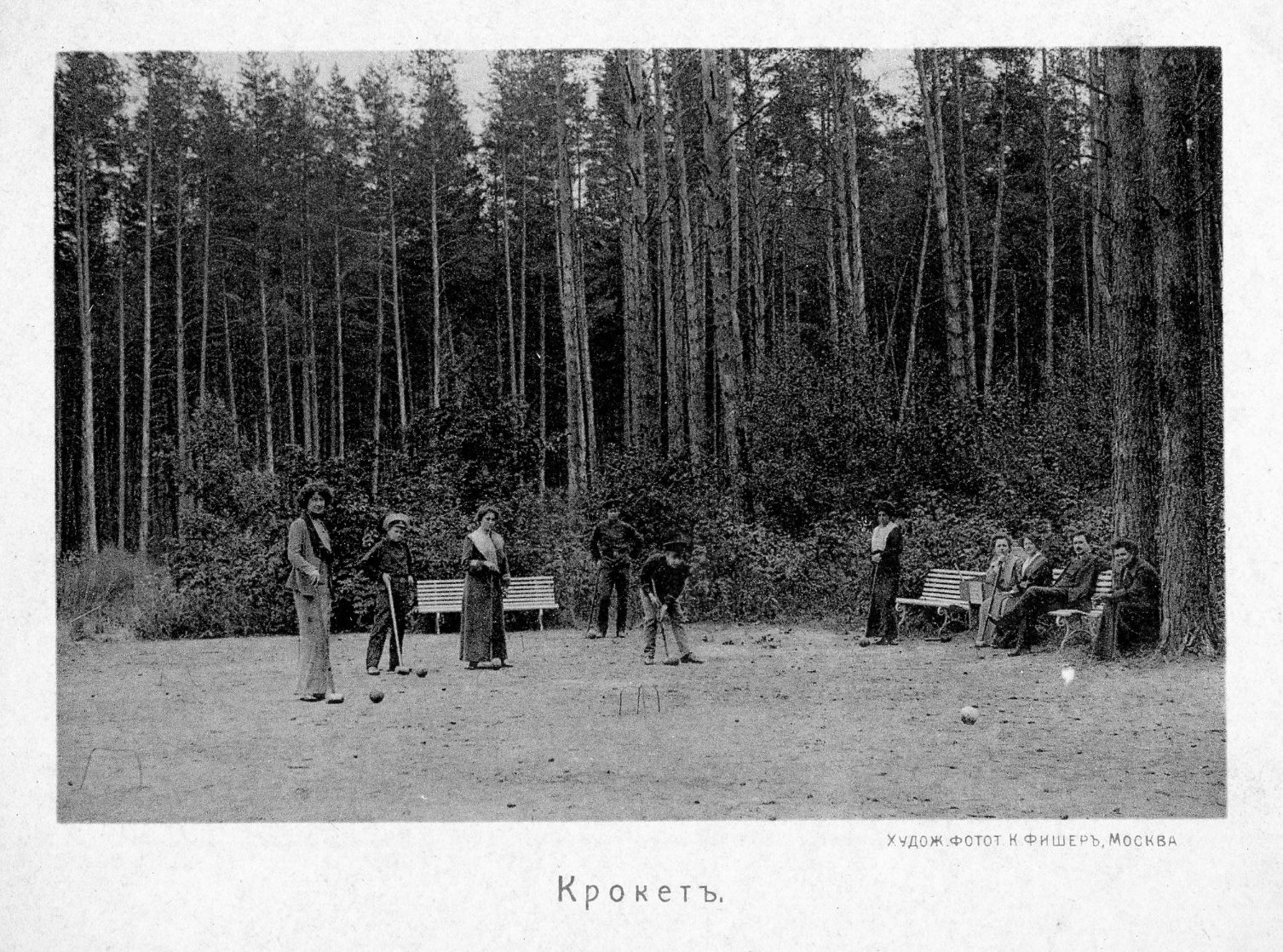 Крокет в санатории "Лесное", Ставрополь (ныне Тольятти)